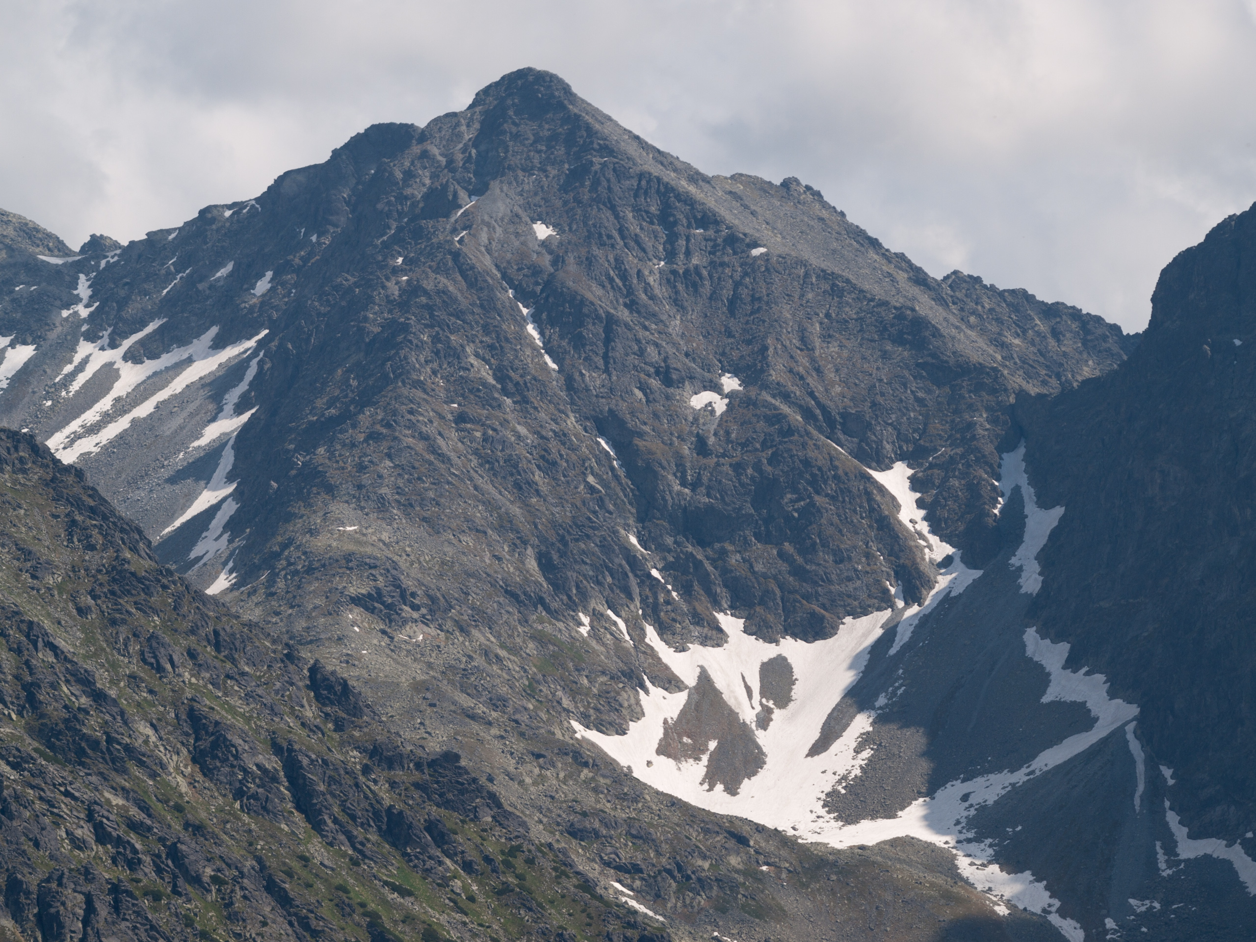 Krótka